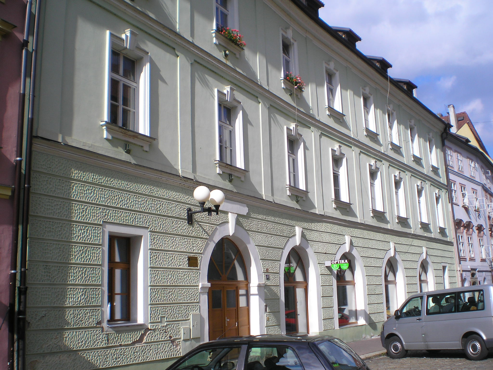 Měšťanský dům (Cheb), Březinova 469/6, Cheb